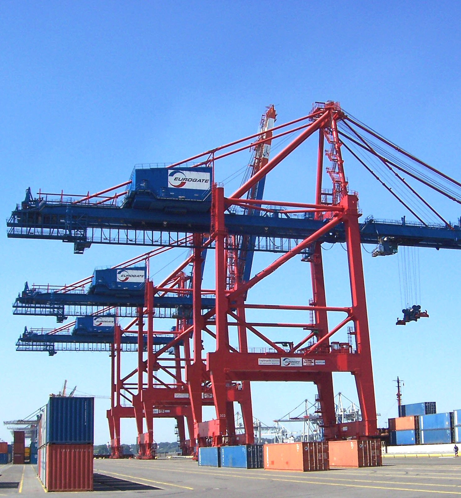 Verladebrücken Eurogate in Hamburg